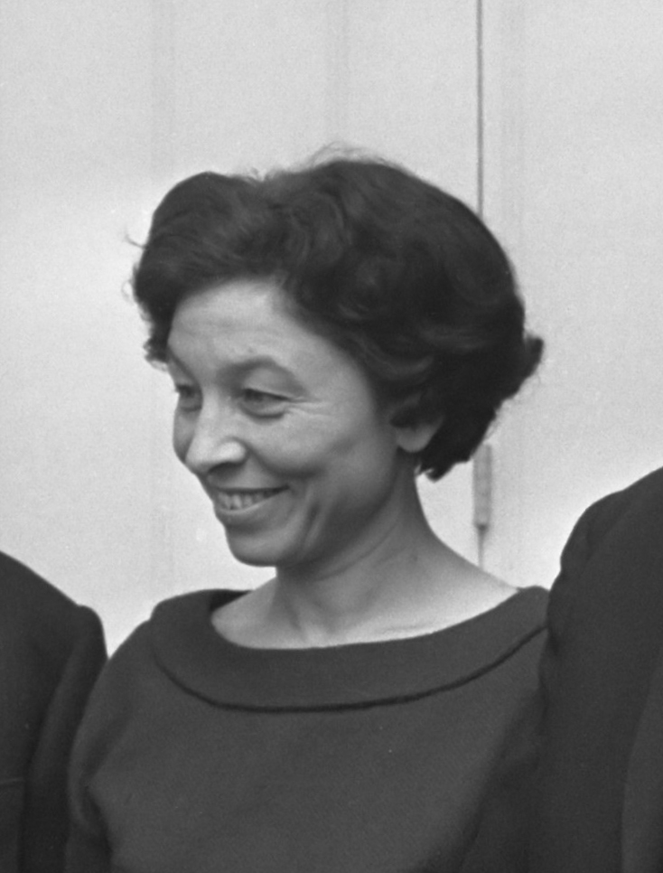 Prijsuitreiking Jan Campertstichting te Den Haag, Hanny Michaelis*6 april 1967